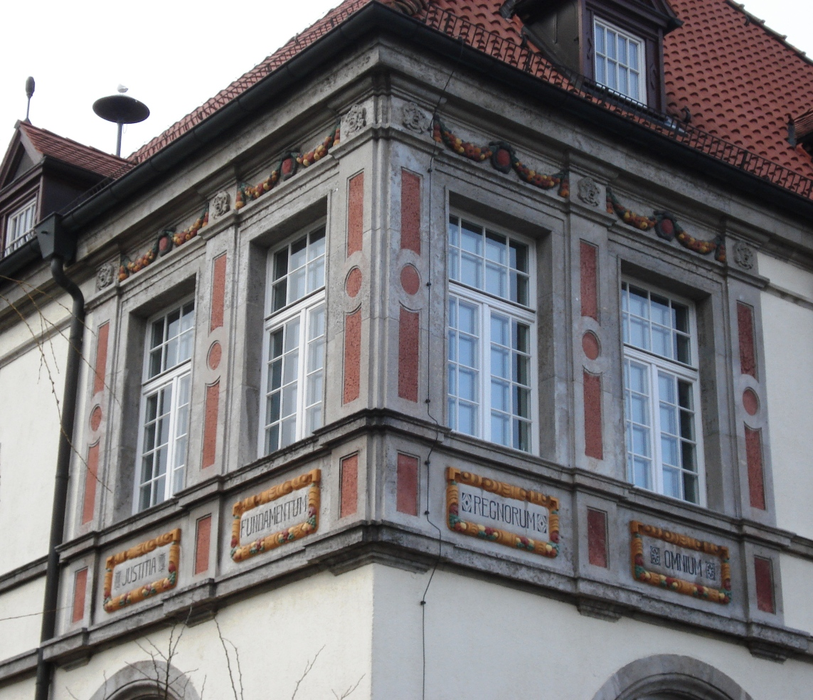 Detail am Amtsgericht in Bad Schwartau - Laube